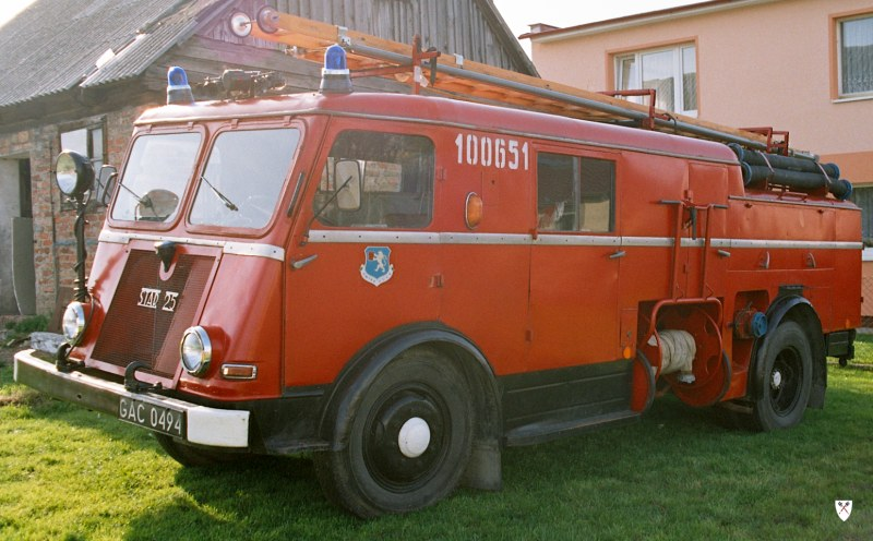 Jelcz 002 GBM 2/8 na podwoziu Star 25, kabina typu N-751 (1960-1964)